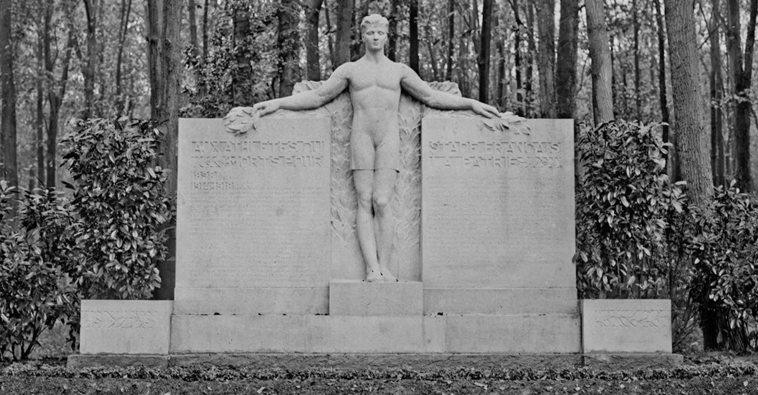 Denkmal gefertigt von Jean Verschneider (1872-1943), Titel: Monument aux athlètes du Stade français morts pour la patrie, im Parc de Saint-Cloud in Saint-Cloud, Frankreich. Original description: "[Parc de Saint-Cloud, monument] aux athlètes du Stade français morts pour la patrie : [photographie de presse] / [Agence Rol]"